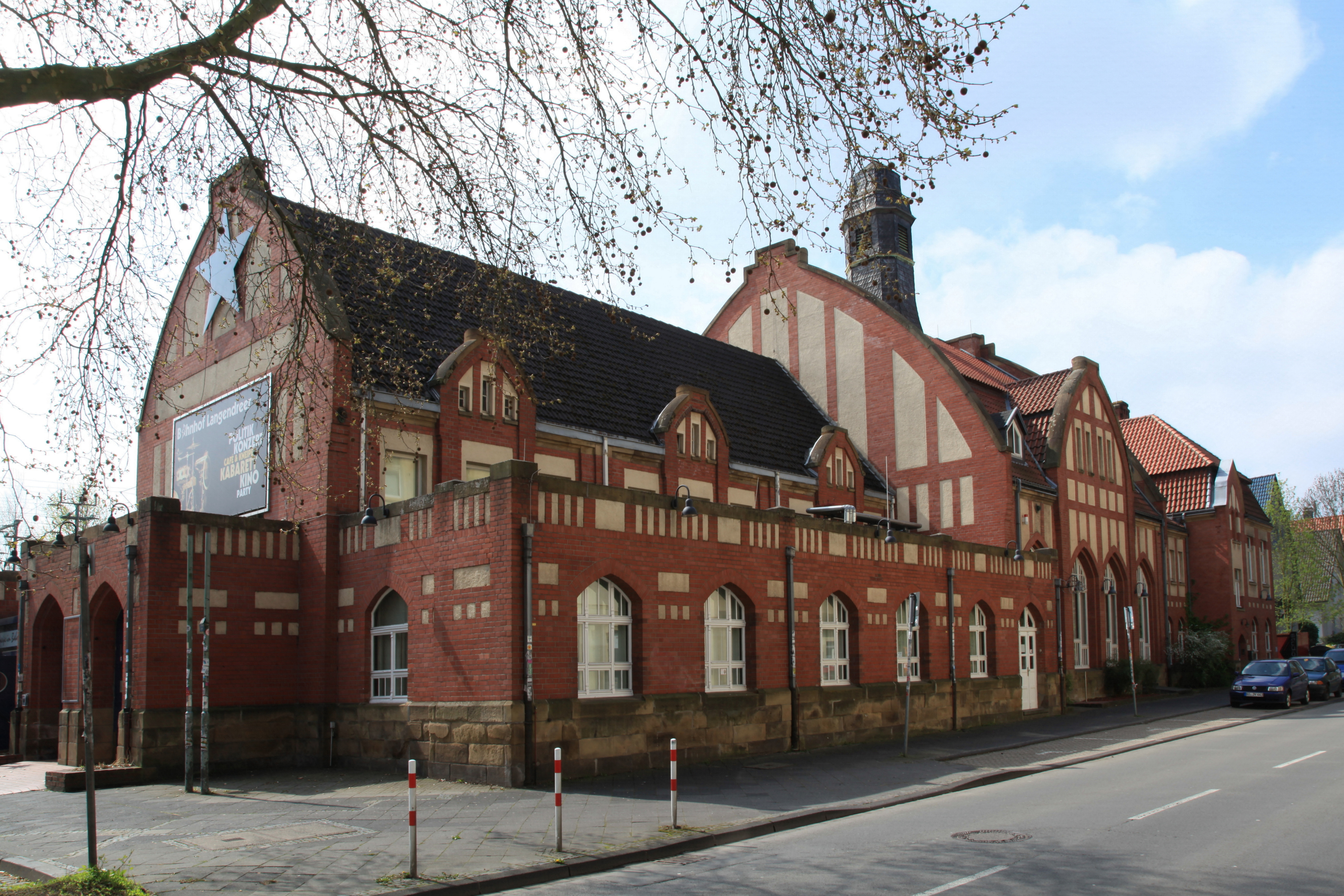 Kulturbahnhof Langendreer, Wallbaumweg 108 in Bochum-Langendreer